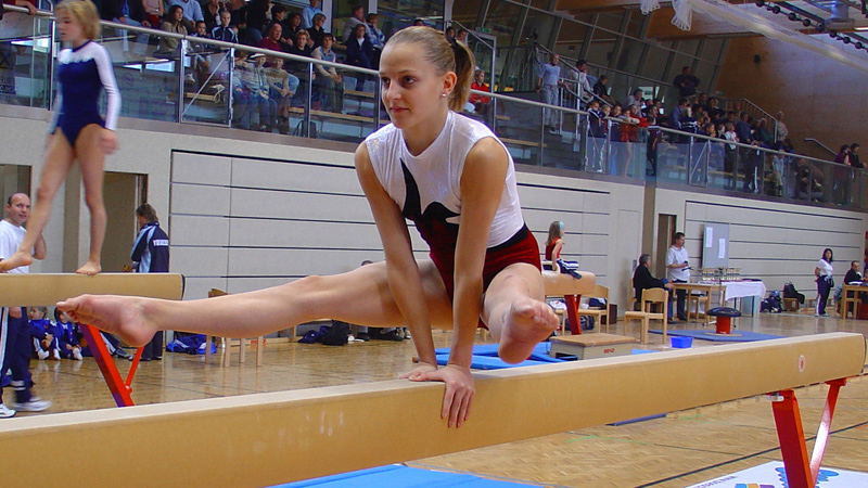 Barbara Gasser im Alter von 13 Jahren als Nachwuchs-Meisterin in Lustenau.